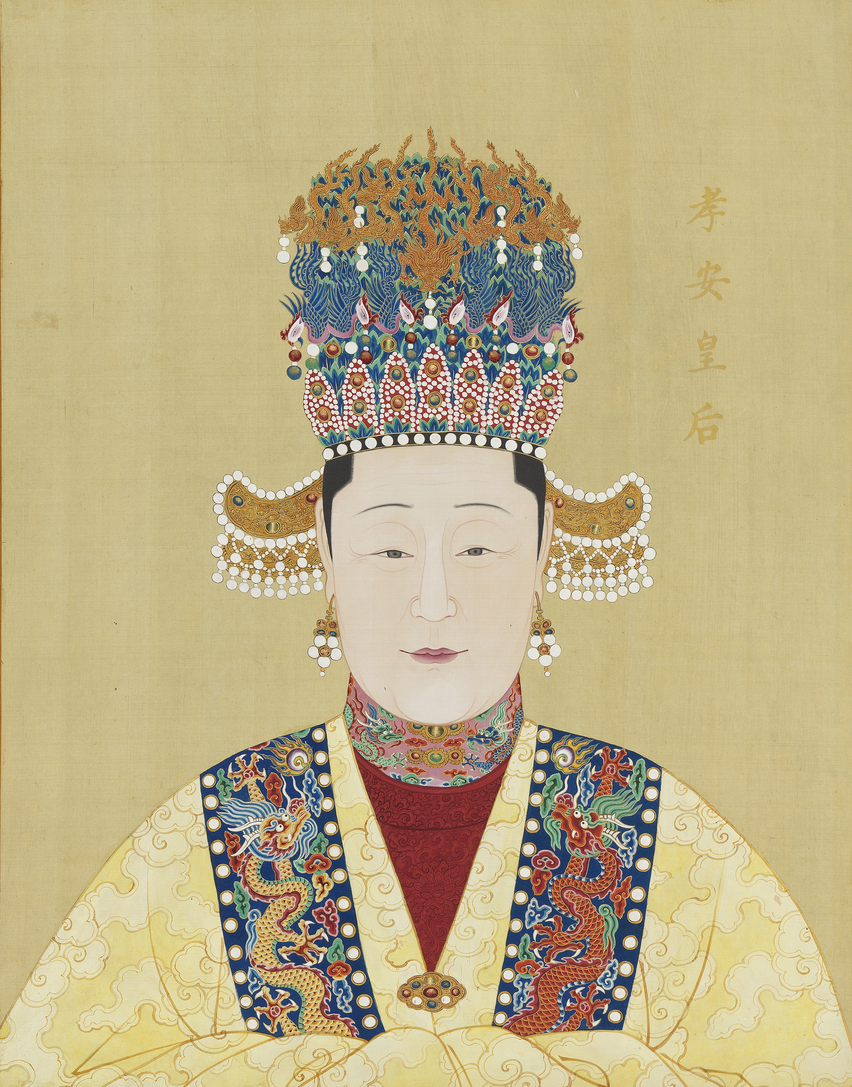 明代帝后半身像（二） 冊 孝安皇后